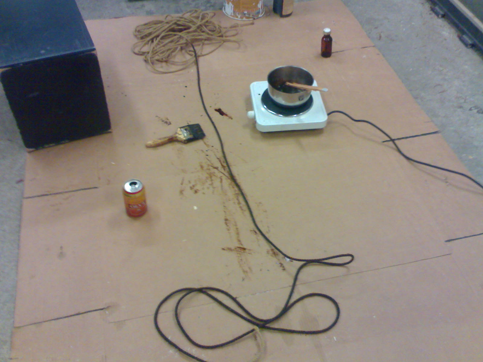 Suopungin tervaus lämmitetyllä tervalla.